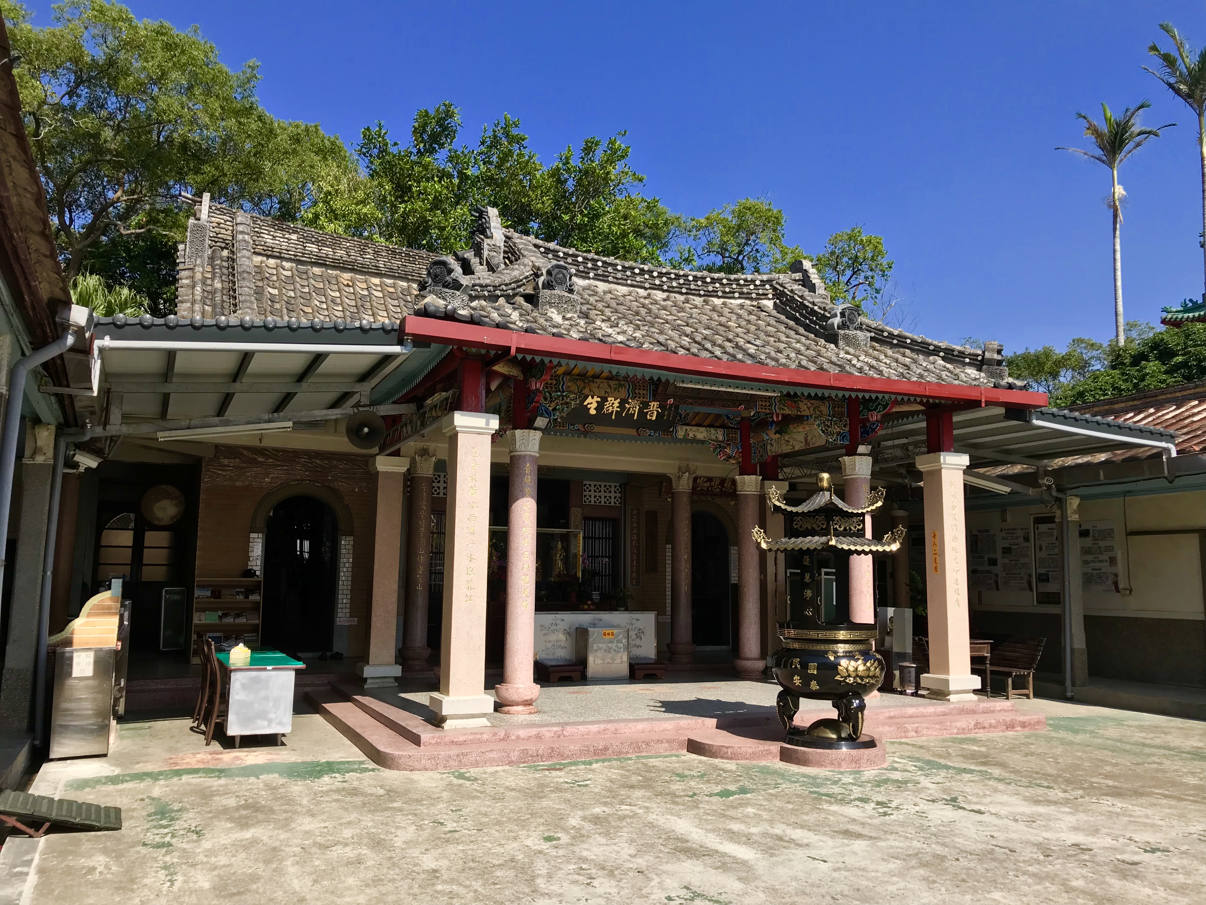 中文（台灣）: 新蓮寺斜照